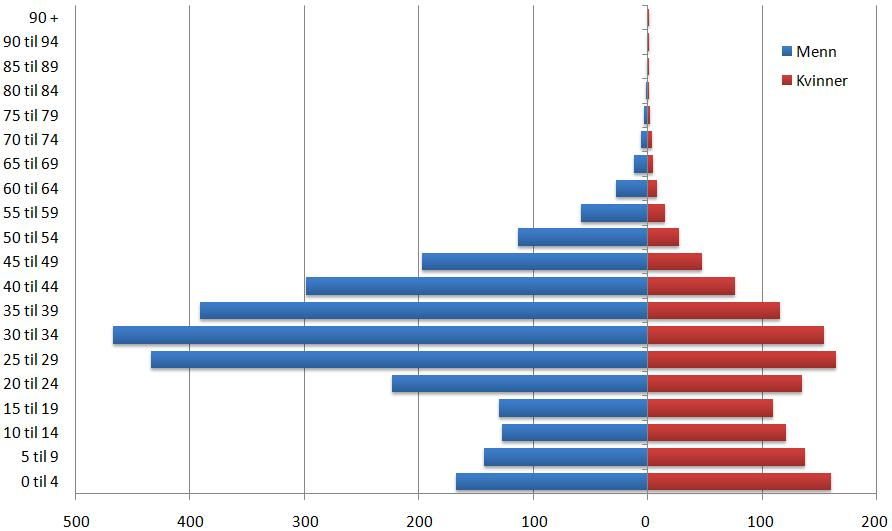 De Forente Arabiske Emiraters befolkningspyramide fra 2005